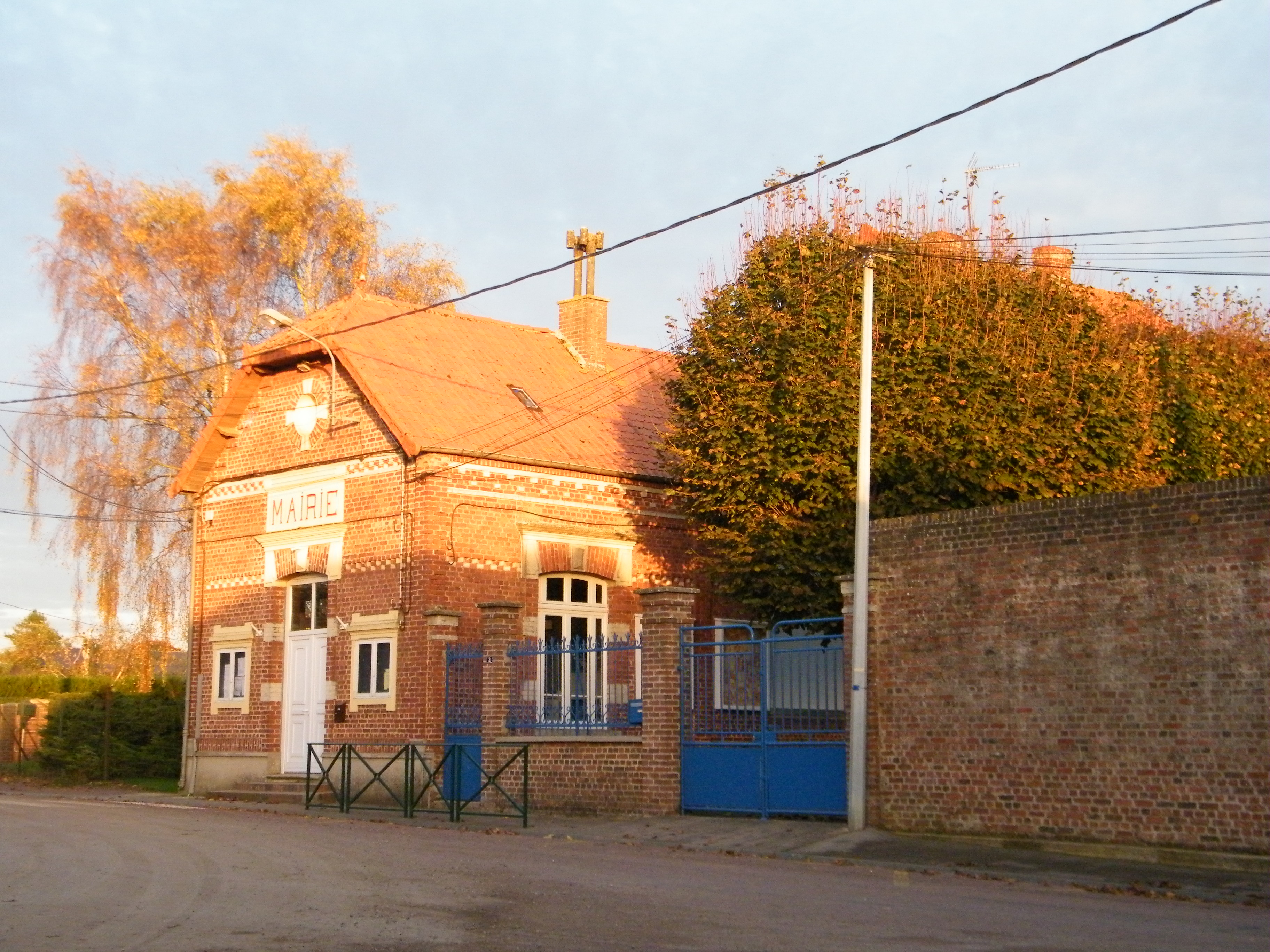 Mairie-école.